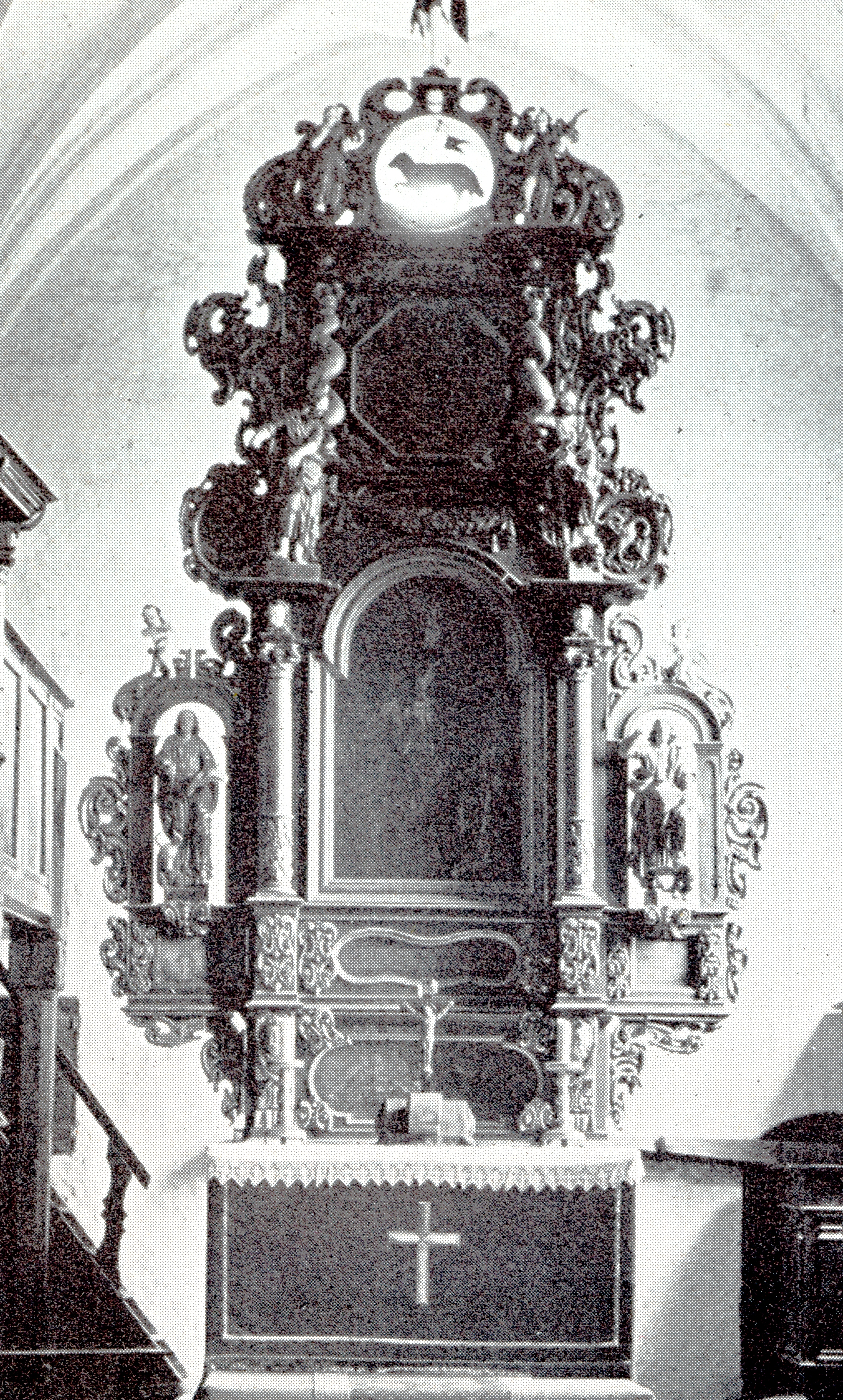 Cumehnen, evangelische Pfarrkirche, Altar von Joh. Pfeffer, 1676